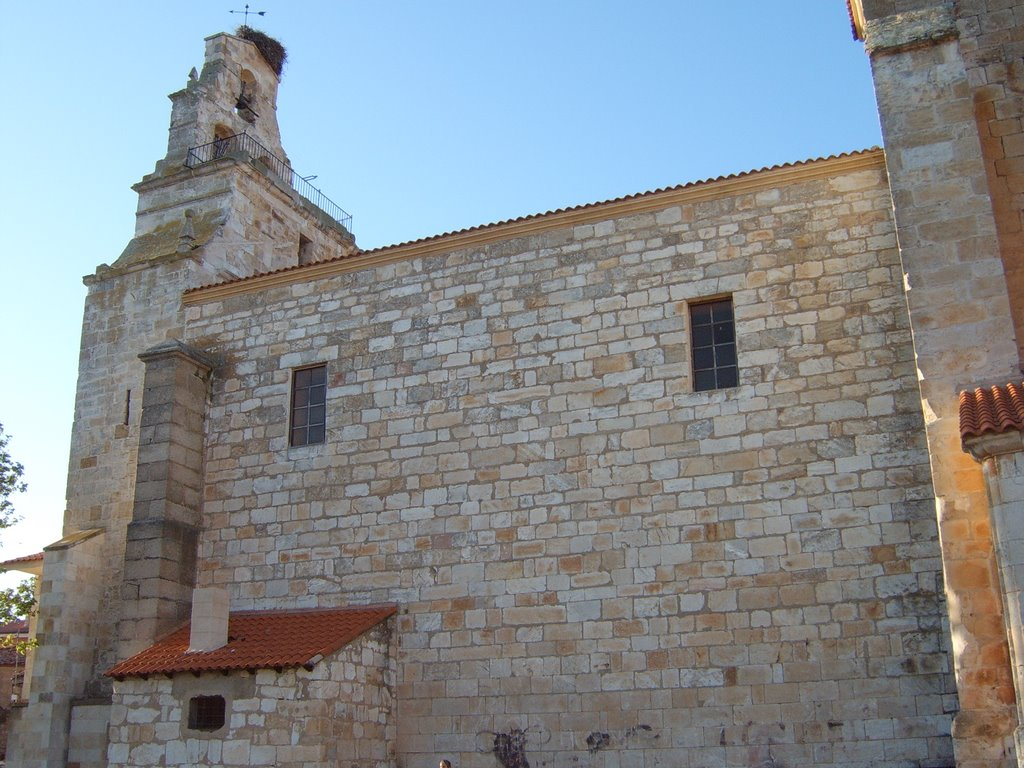 Iglesia Parroquial de Almaraz de Duero (Zamora-España)